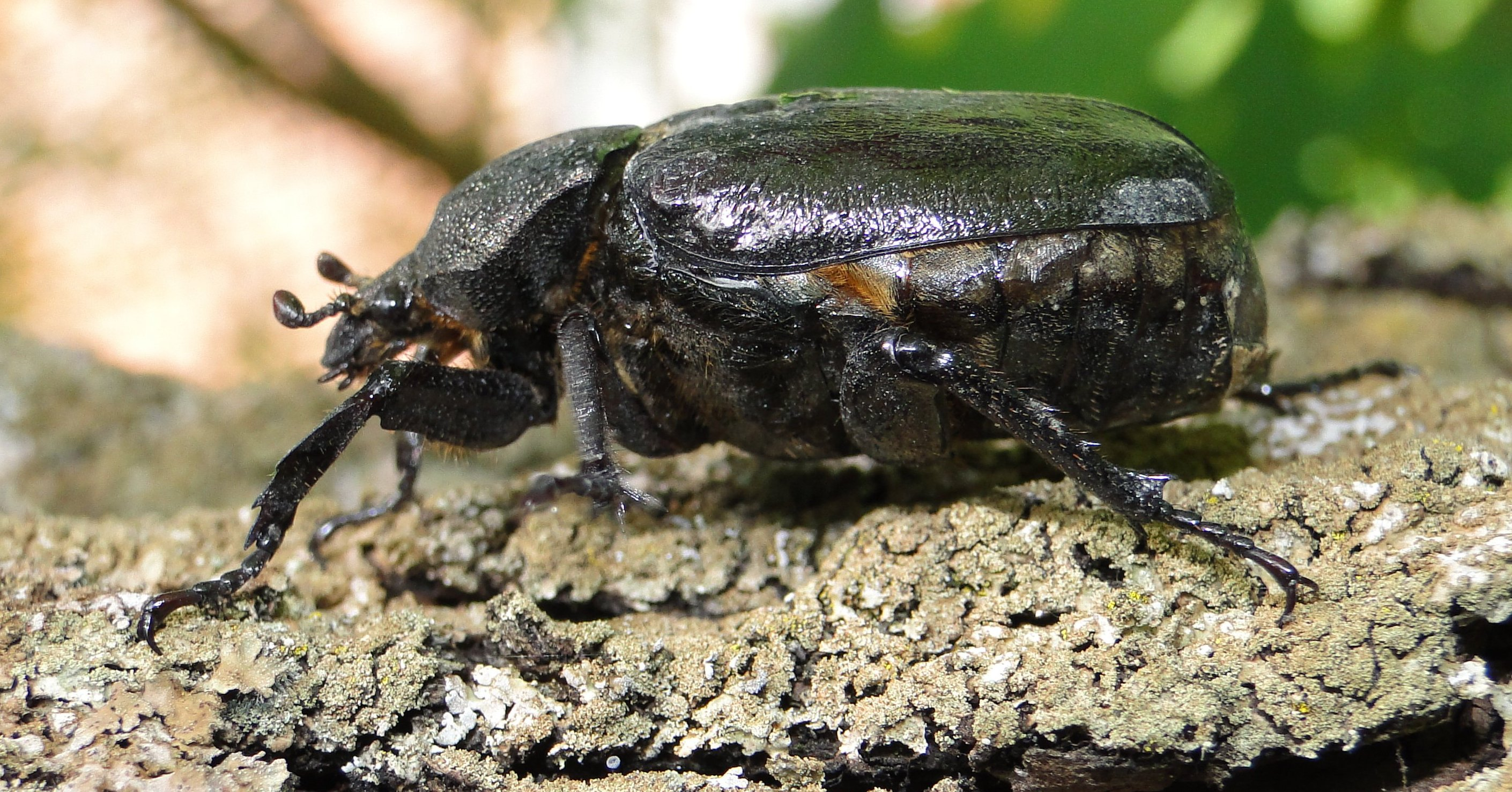 Osmoderma eremita